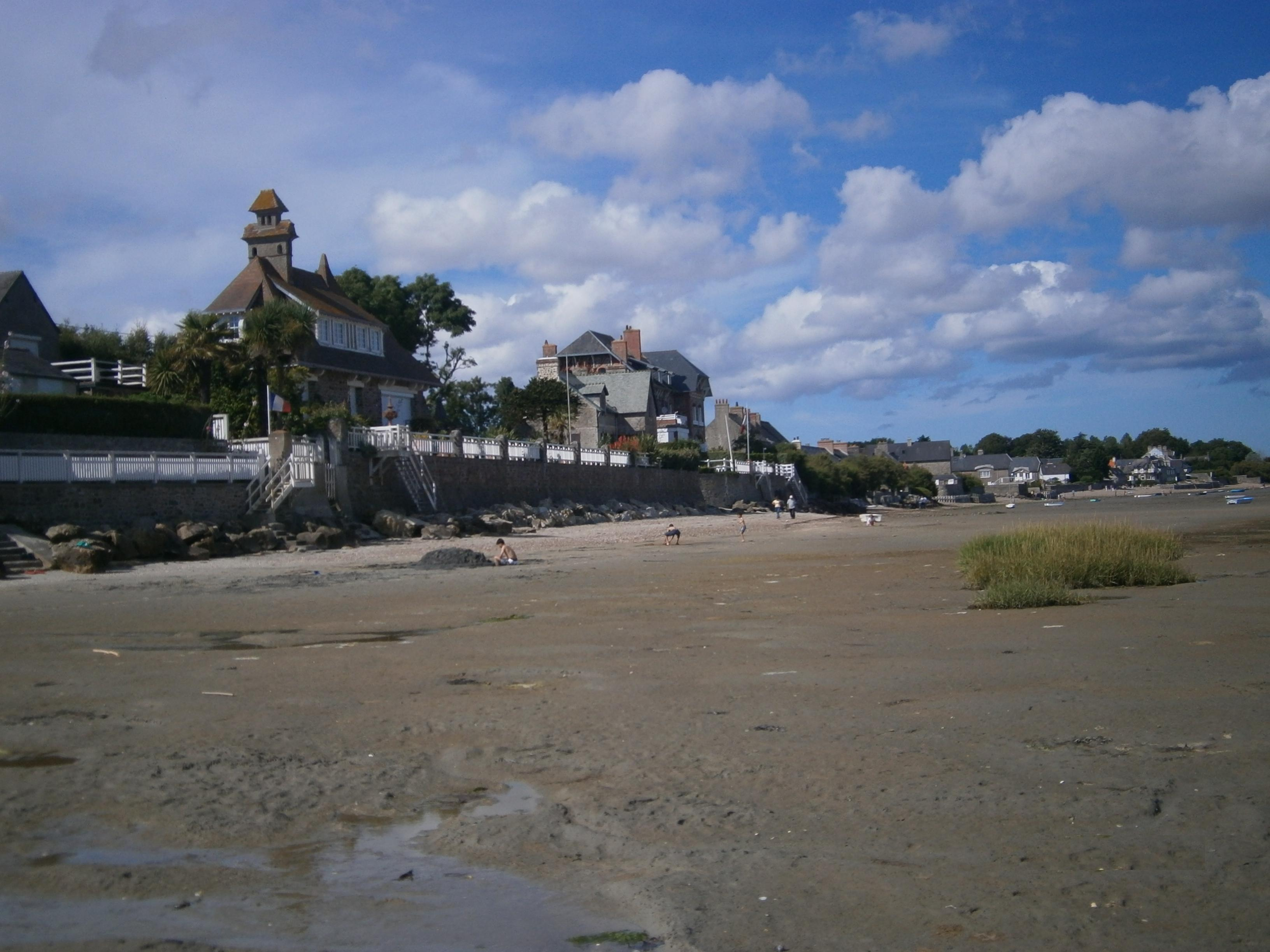 Sicht auf die Küste in Morsalines (Frankreich)